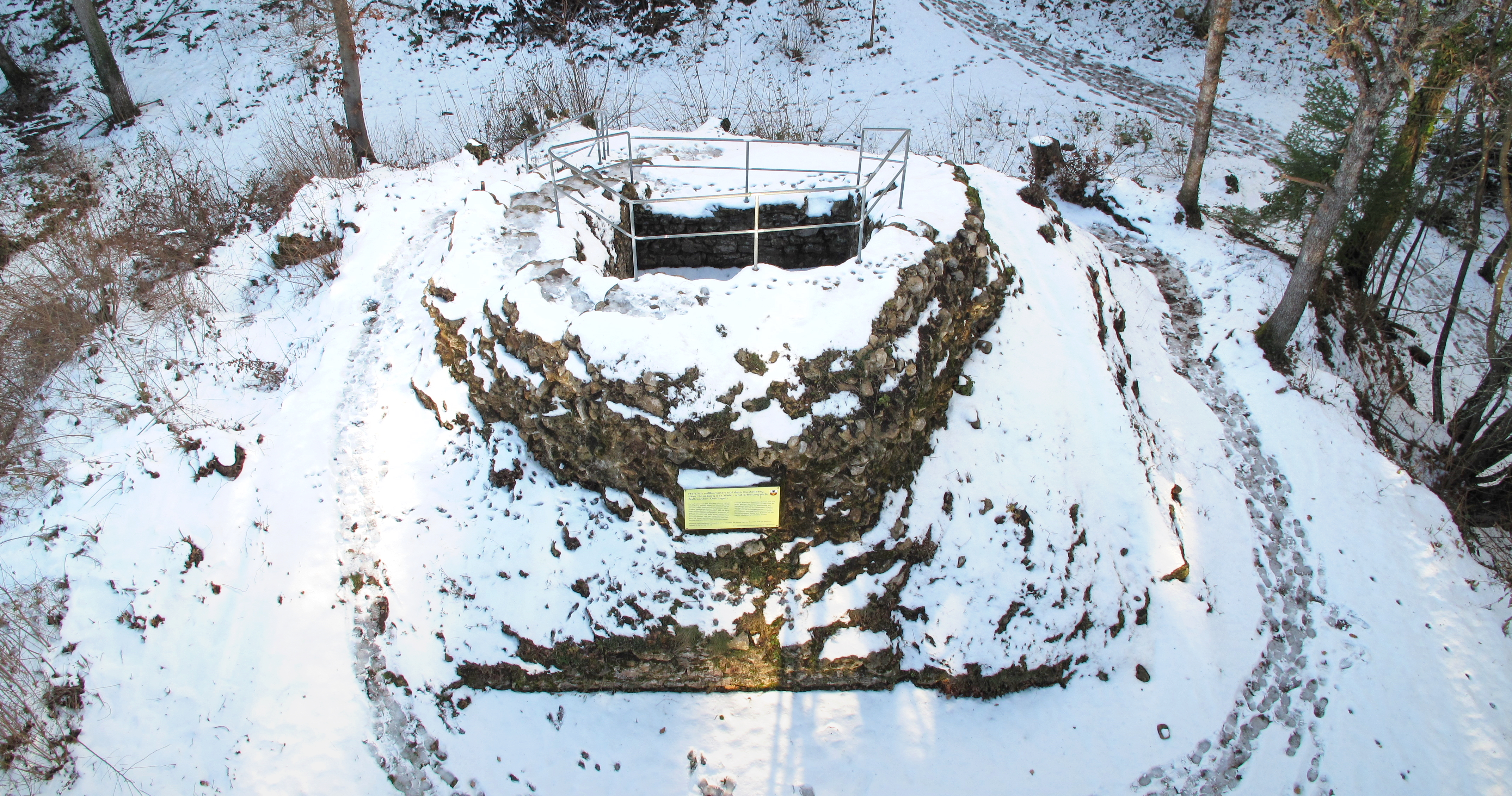 Blick vom Aussichtsturm auf den Nordteil des oberen Burgplatzes mit dem Turmrest.